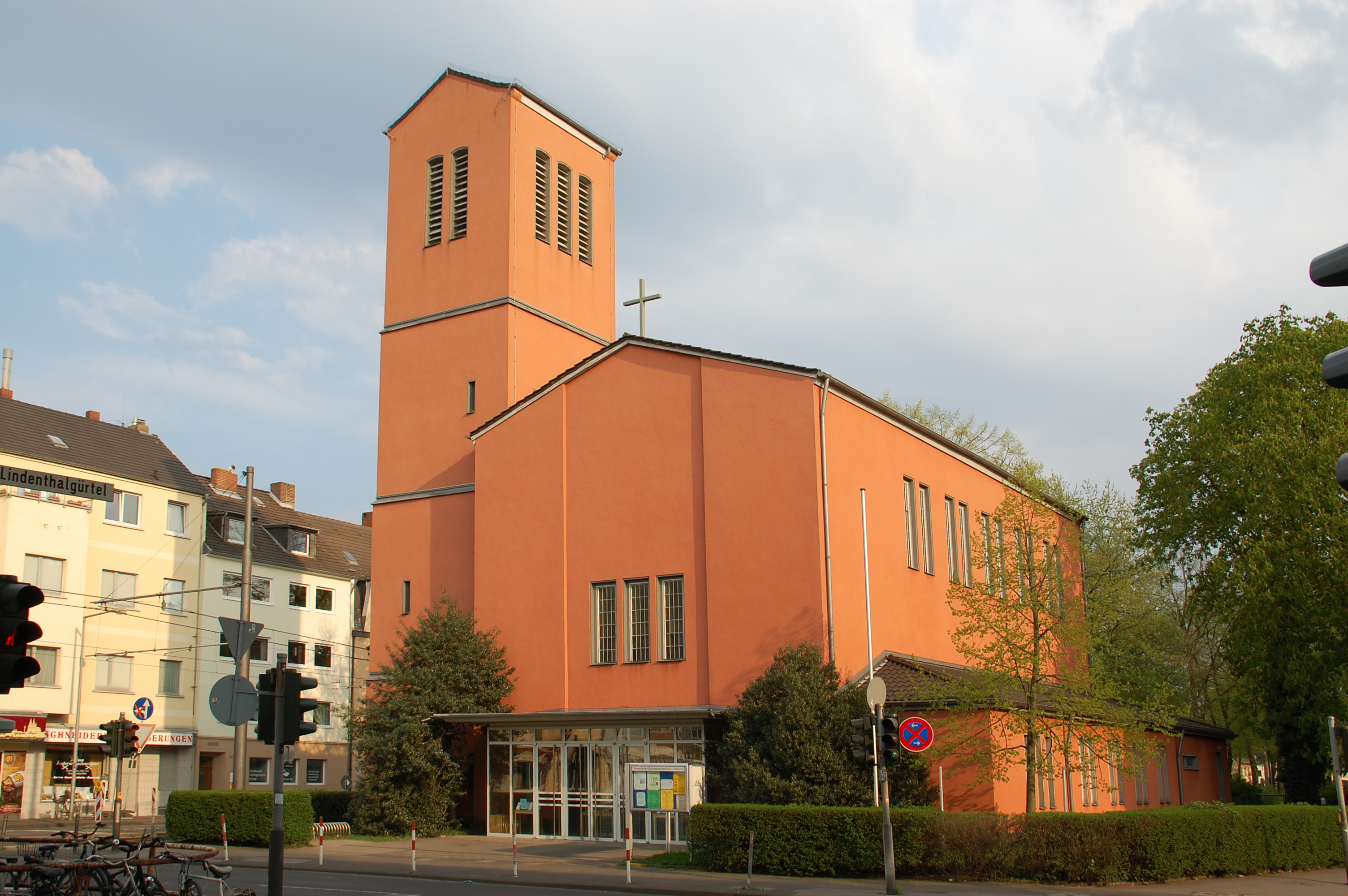 Paul-Gerhard-Kirche Lindenthal, Cologne, Germany